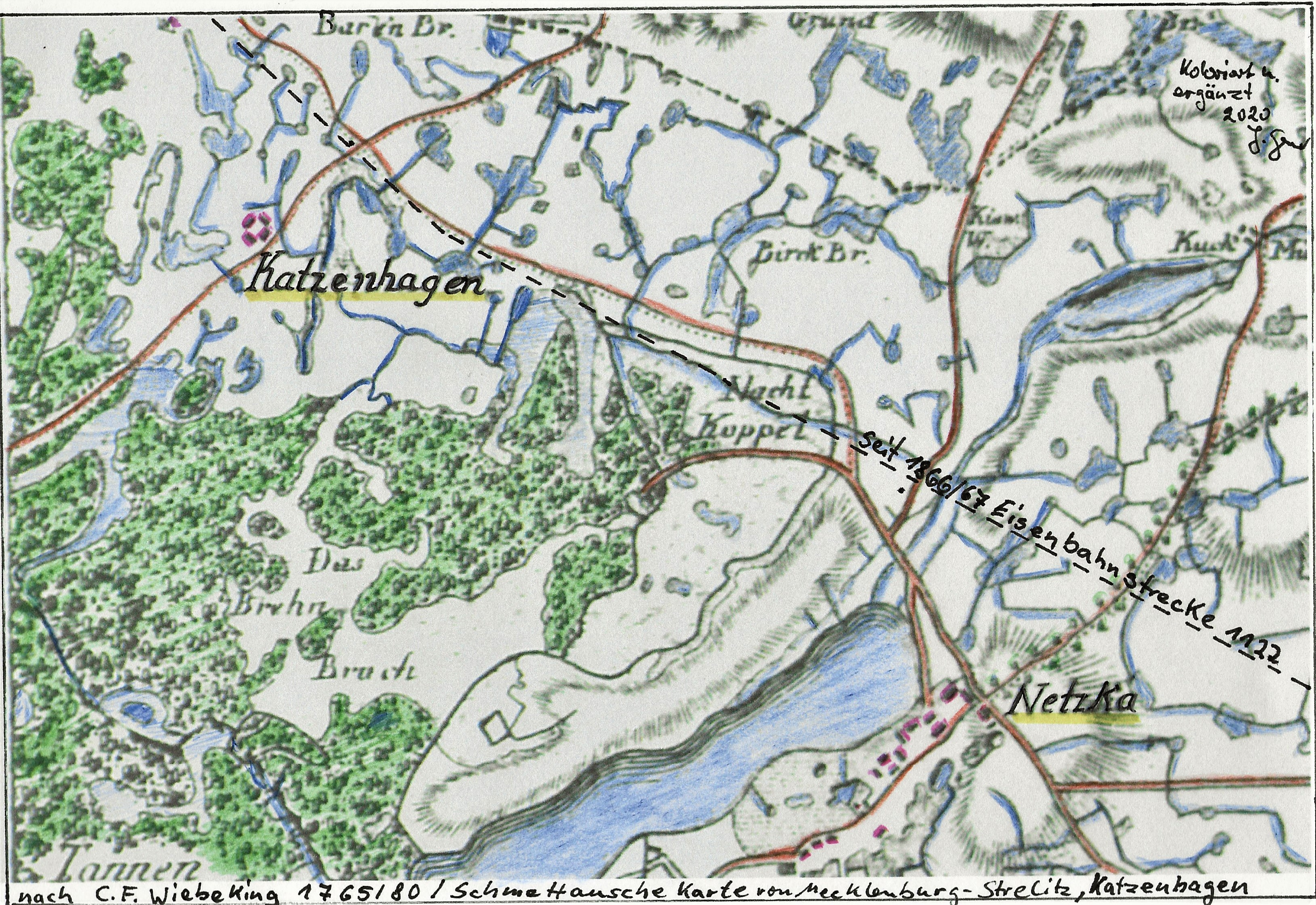 Katzenhagen um 1767. Ein Kartenausschnitt aus der Wiebeking-Schmettauschen Karte von Mecklenburg-Strelitz. Katzenhagen ist eine verlassene Ort , der in der DDR von 1970 bis 1990 für die NVA genutzt wurde, danach Nutzung durch die Bundeswehr. Aufgabe des Objektes. Heute Nutzung als Naturausgleichsfläche.